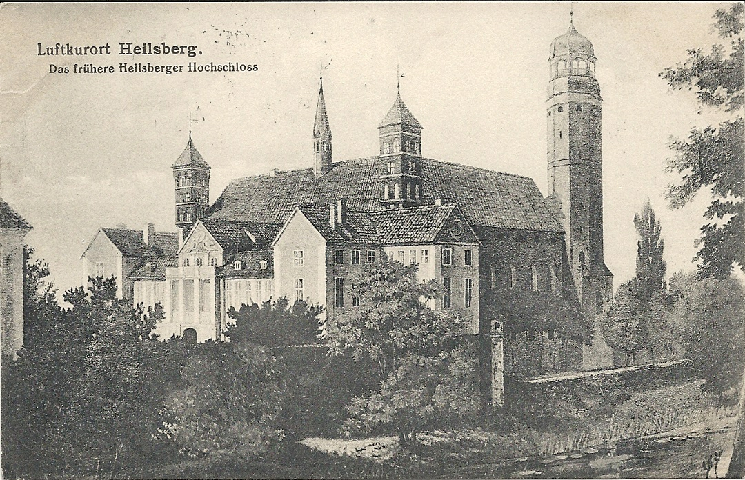 Litografia przedstawiająca zamek biskupów warmińskich w Lidzbarku Warmińskim z nieistniejącym już pałacem biskupa Wydżgi rozebranym w 1840 roku, reprodukowana na pocztówce sprzed 1916 roku (rok obiegu skanowanego egzemplarza).